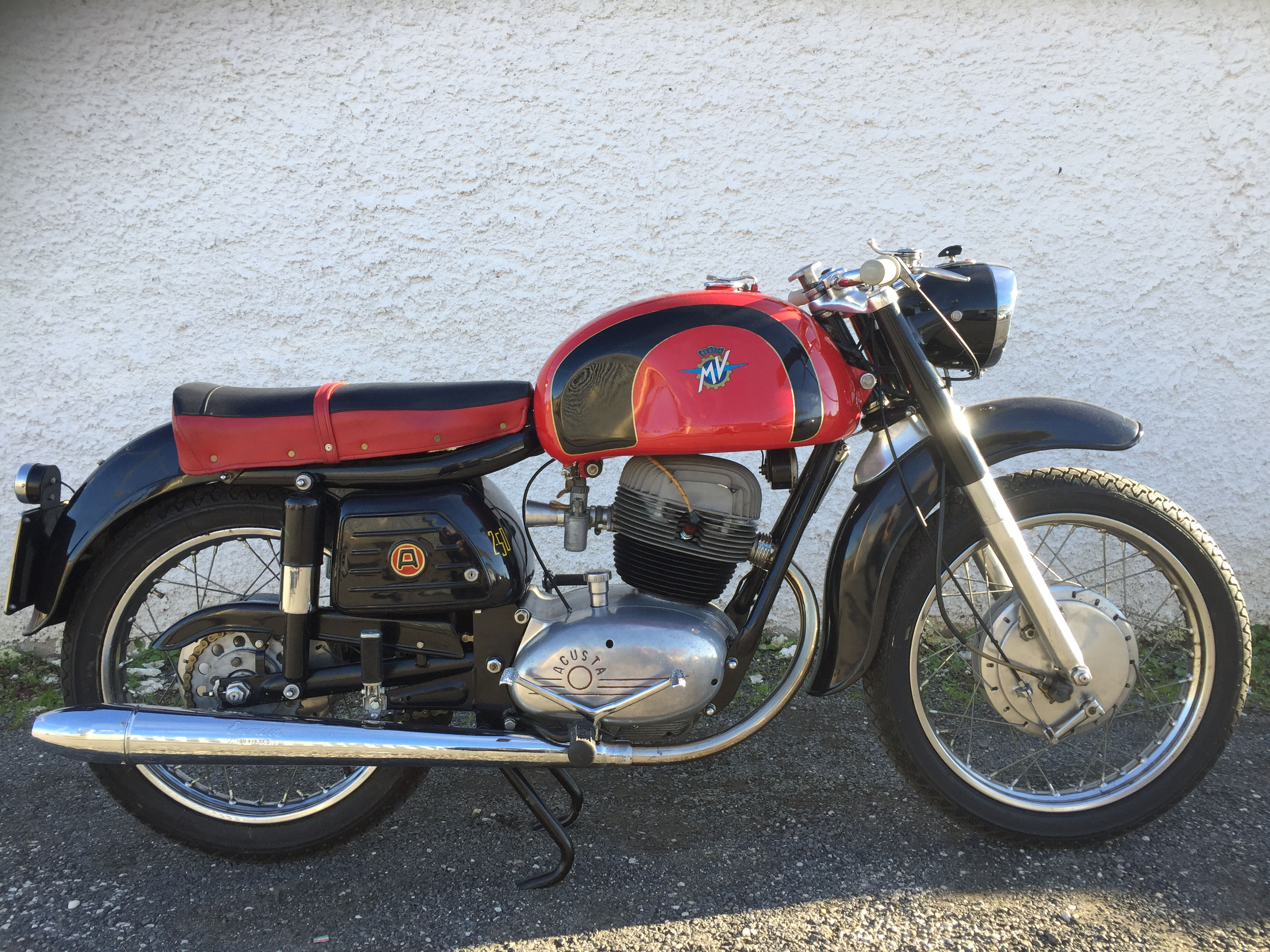 Motocicletta